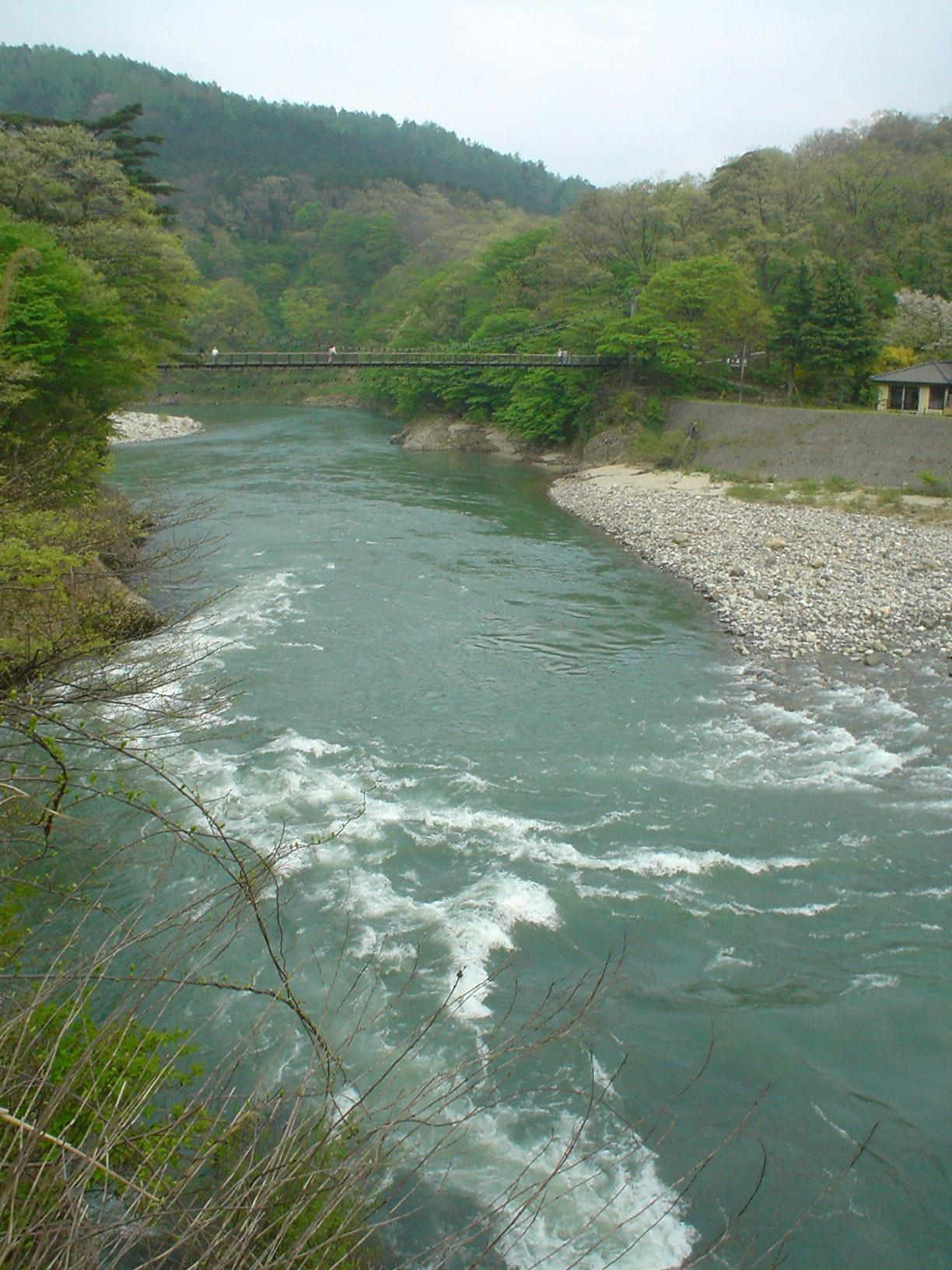 Arakawa River in Niigata, Japan.ja: 荒川（新潟県岩船郡関川村鷹の巣温泉付近）